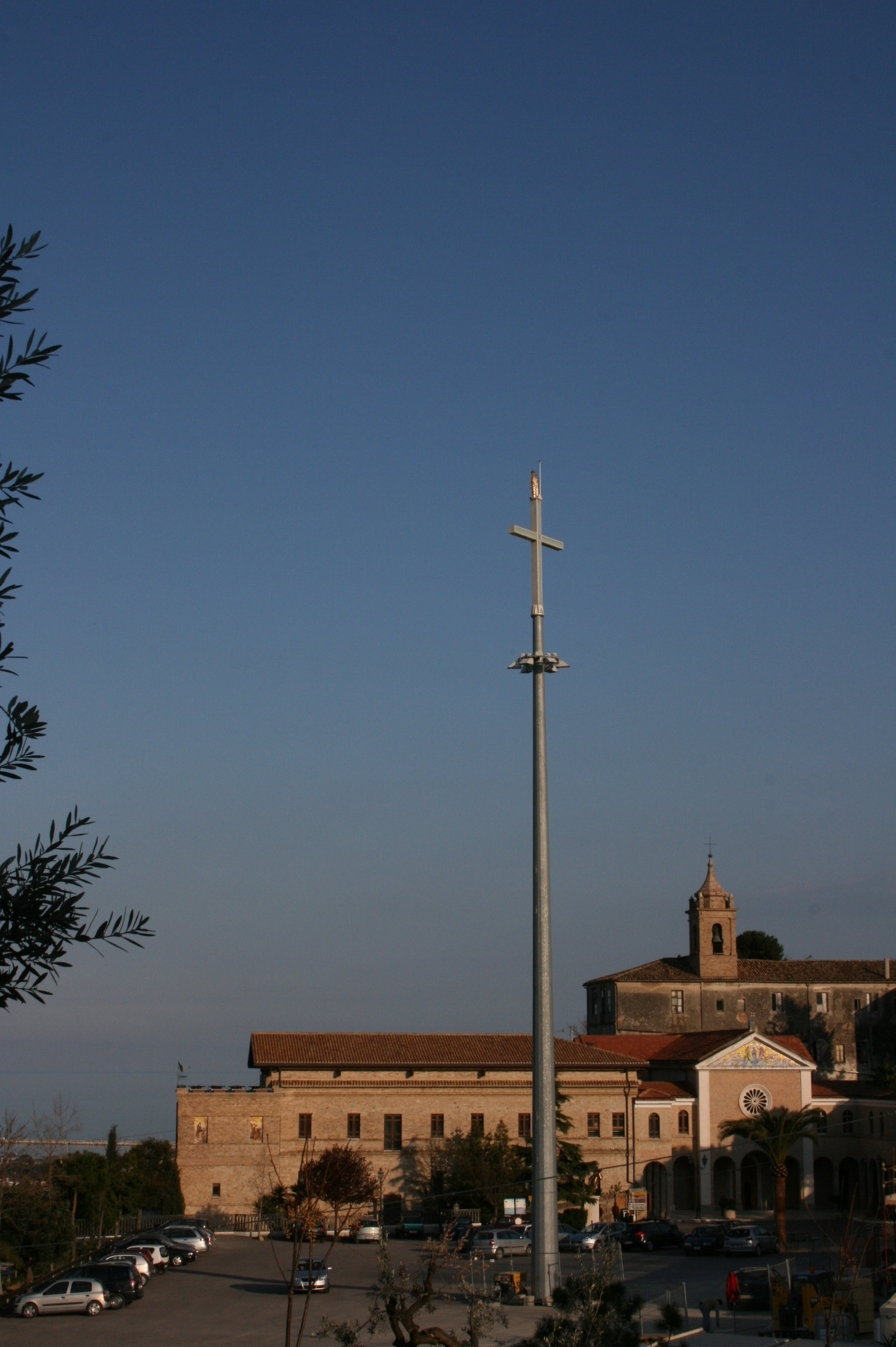 visuale del santuario della madonna dello splendore di Giulianova-te